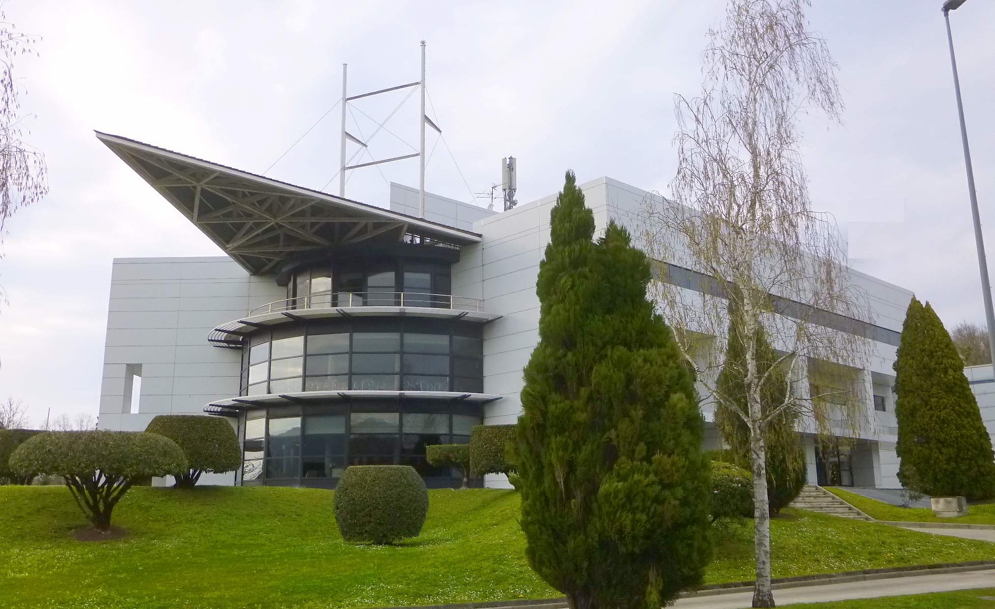 Zamudio - Parque Científico y Tecnológico de Bizkaia, Edificio 101